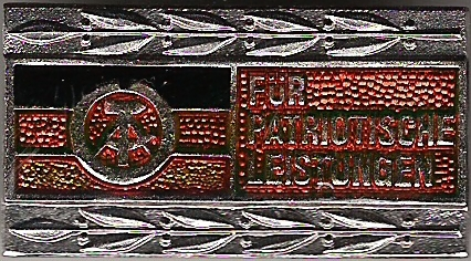 Ehrennadel der Nationalen Front in Silber von 1987